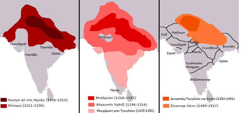 Ελληνική μετάφραση του File:Delhi History Map.png